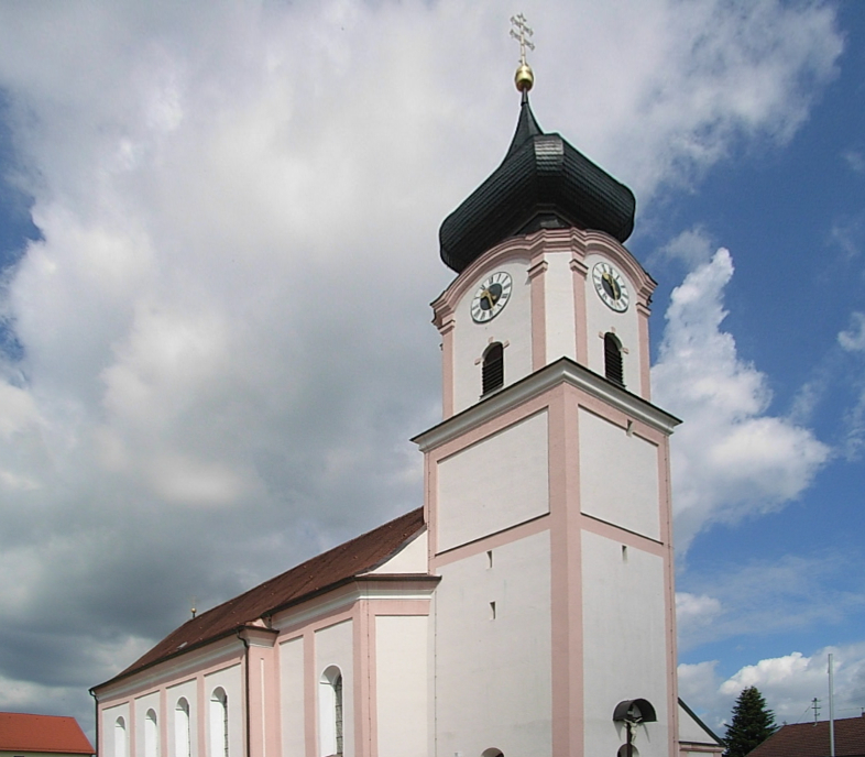 Pfarrkirche Mariä Verkündigung in Roßbach